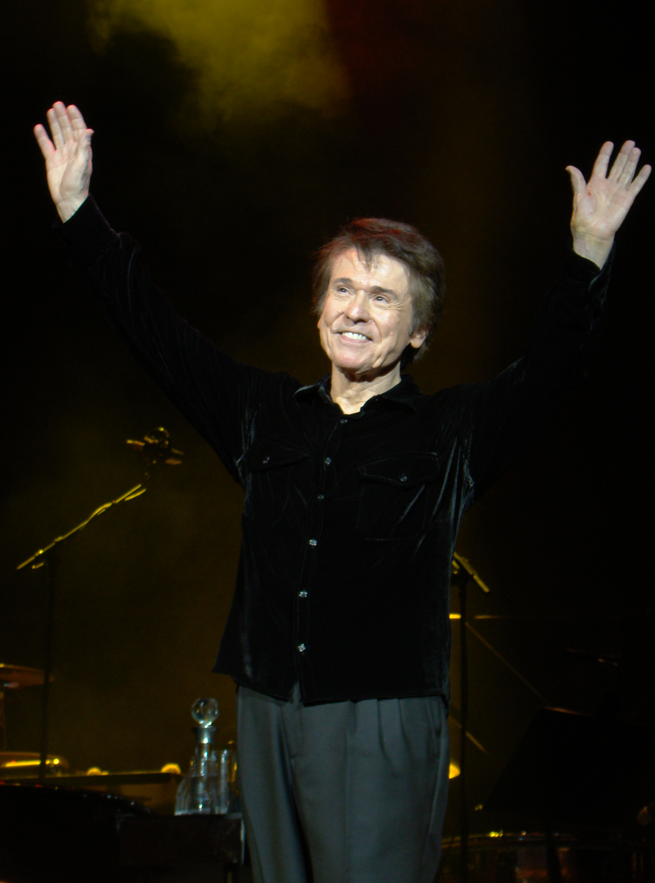 Raphael con los brazos extendidos